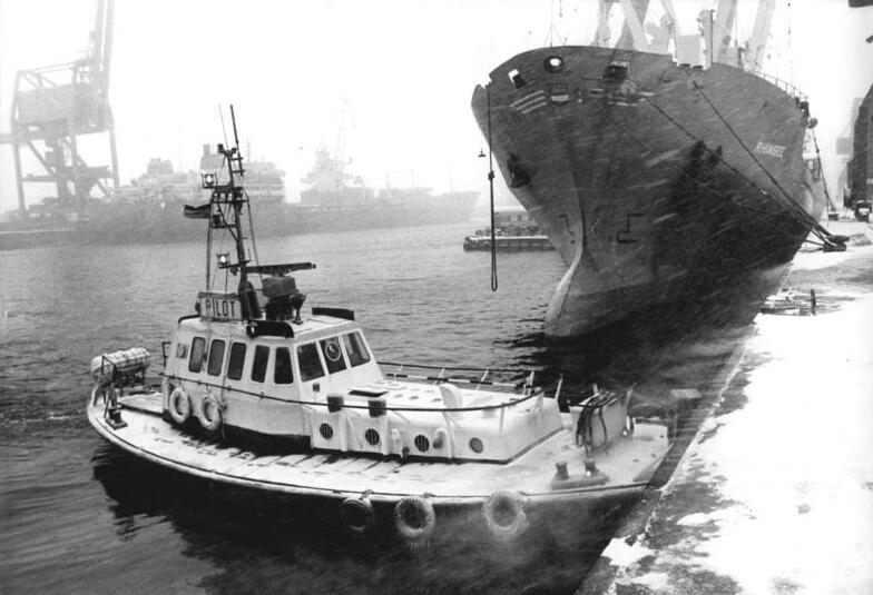 Rostock, Überseehafen, Schlepper, Winter ADN-ZB Sindermann 10.1.1987-pre - Rostock: Schneefälle erschweren Güterumschlag - Anhaltende Schneefälle und Temperaturen unter dem Gefrierpunkt erschweren in diesen Tagen die Umschlagarbeiten im Rostocker Überseehafen. Hier, wo 80 Prozent der Umschlagleistungen aller Seehafen vollbracht werden, sollen in diesem Jahr 1 450.000 Tonnen über die Kaikanten gehievt werden. An Bord des DDR-Frachters "Rhinsee" werden Reisezugwagen gebracht. Als Oberdeckladung treten sie ihre Reise nach Ghana an. siehe auch 1987-0110-1 und 3 N